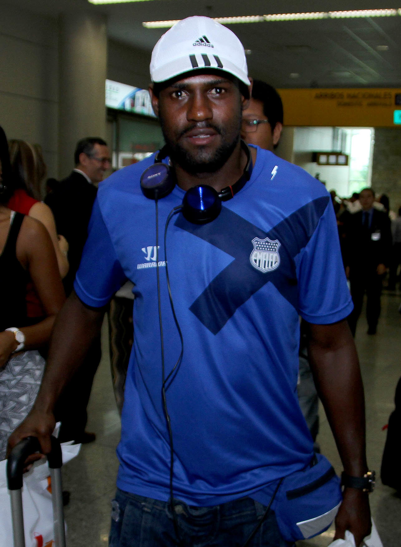 Guayaquil, viernes 23 de enero del 2015 (ANDES).-El equipo de Emelec llegó a Guayaquil luego de realizar la pretemporada en Argentina, en la gráfica el jugador José Luis Quiñonez Foto:César Muñoz/ANDES